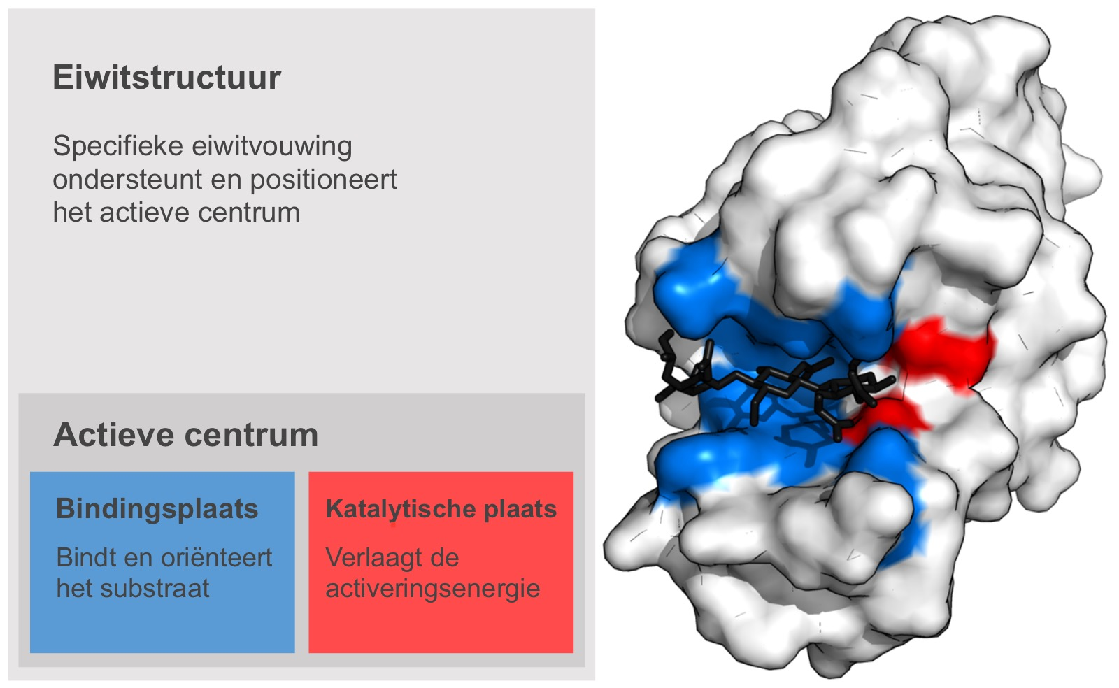 Eiwitstructuur van het enzym lysozym. Bindingsplaats in blauw, katalytische plaats in rood en substraat in zwart.